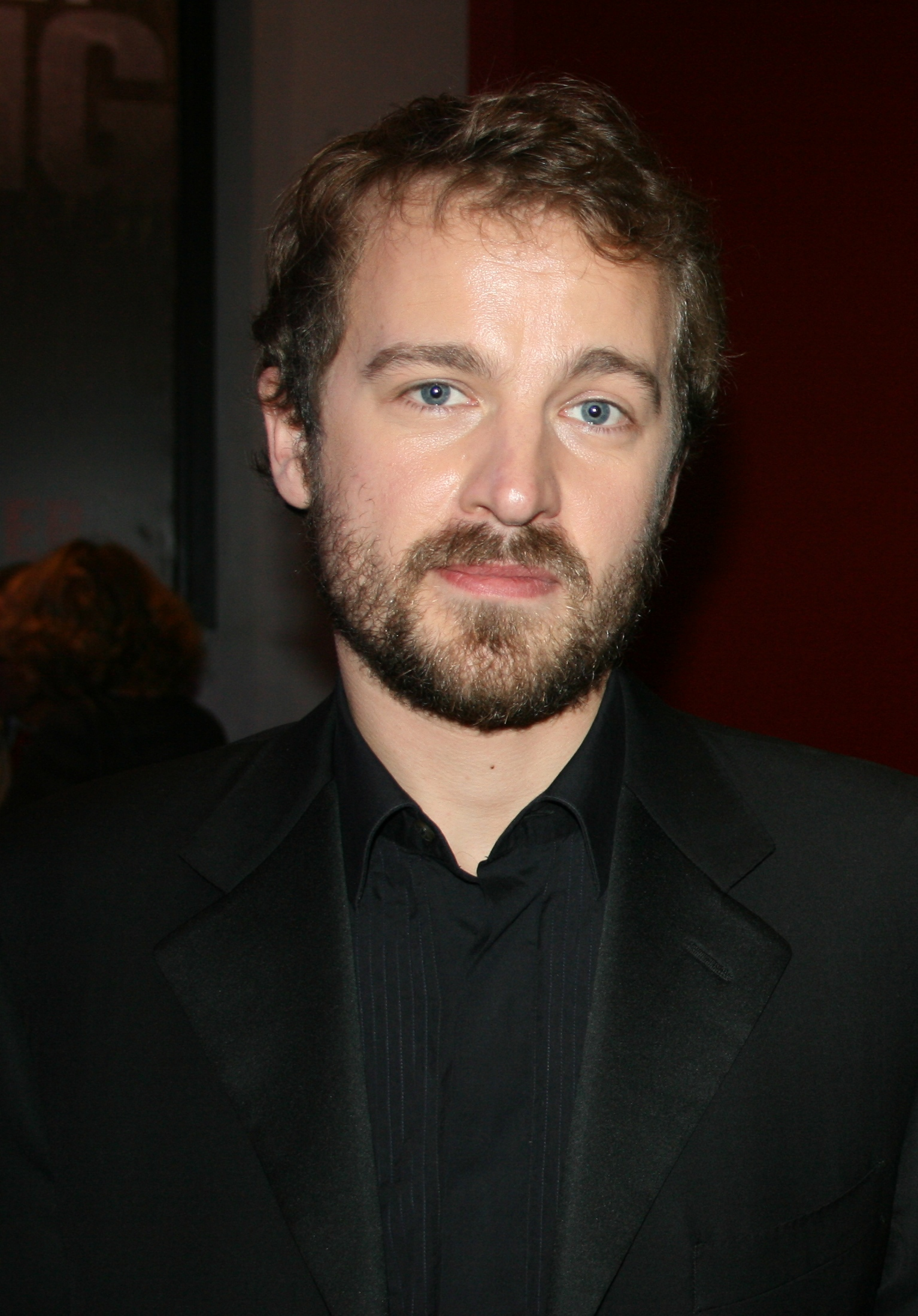 Jocelyn Quivrin à l'avant-première de Notre univers impitoyable diffusée à l'UGC Ciné Cité Les Halles, à Paris.